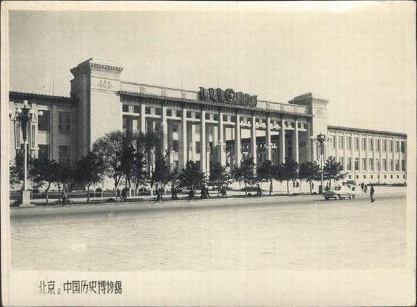 1959年的中国历史博物馆。